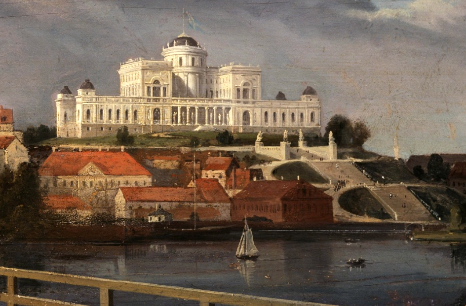 Förslag till Nationalmuseum på Kungsklippan på Kungsholmen (bilden är beskuren)